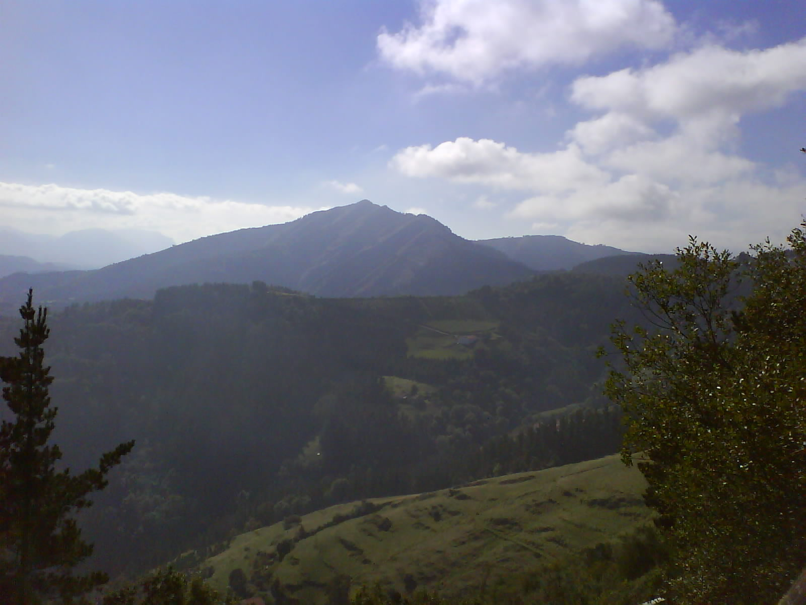 Monte Urko desde Arrate. País Vasco (España).